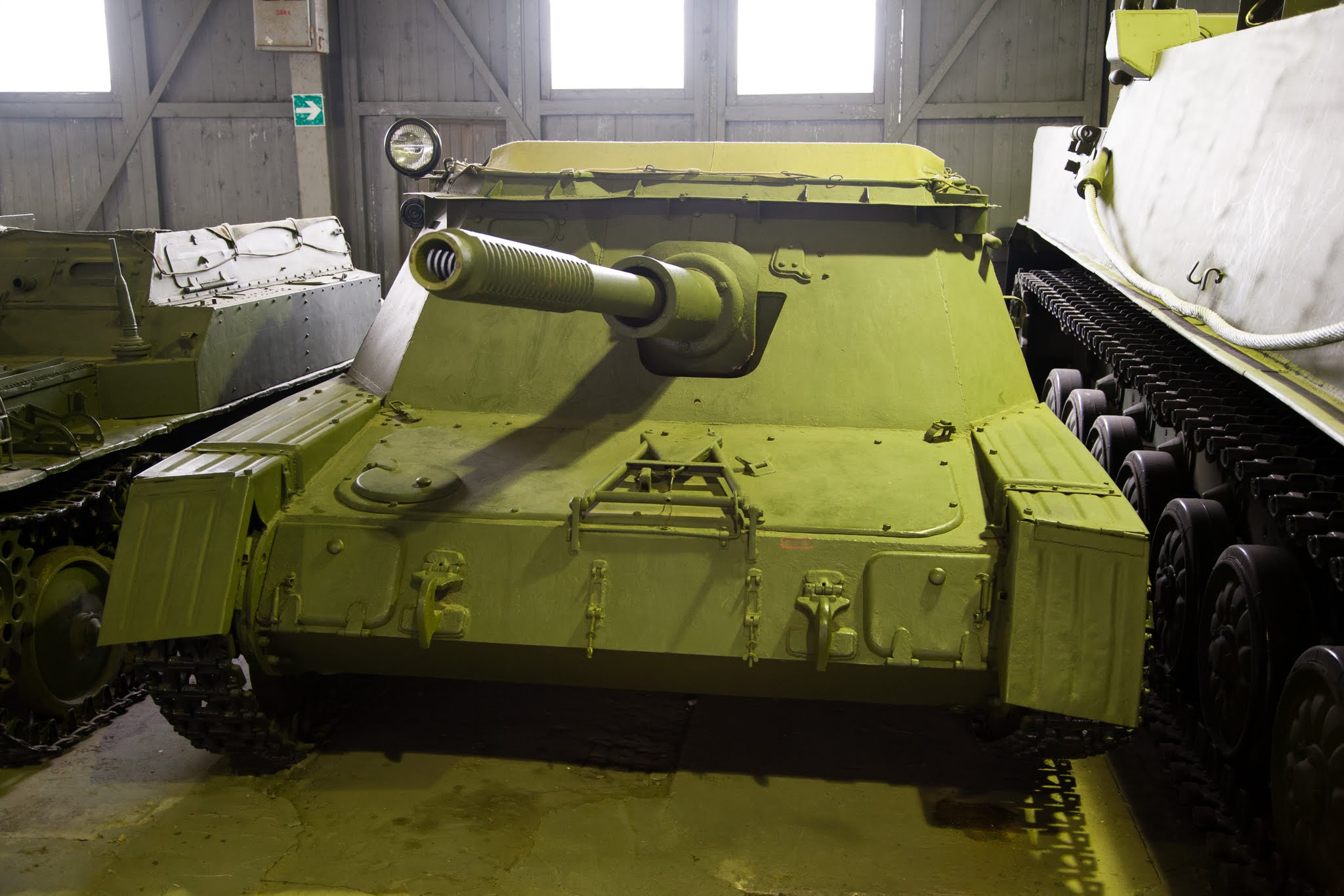 Опытная противотанковая САУ "АСУ-76" в Бронетанковом музее г. Кубинка.